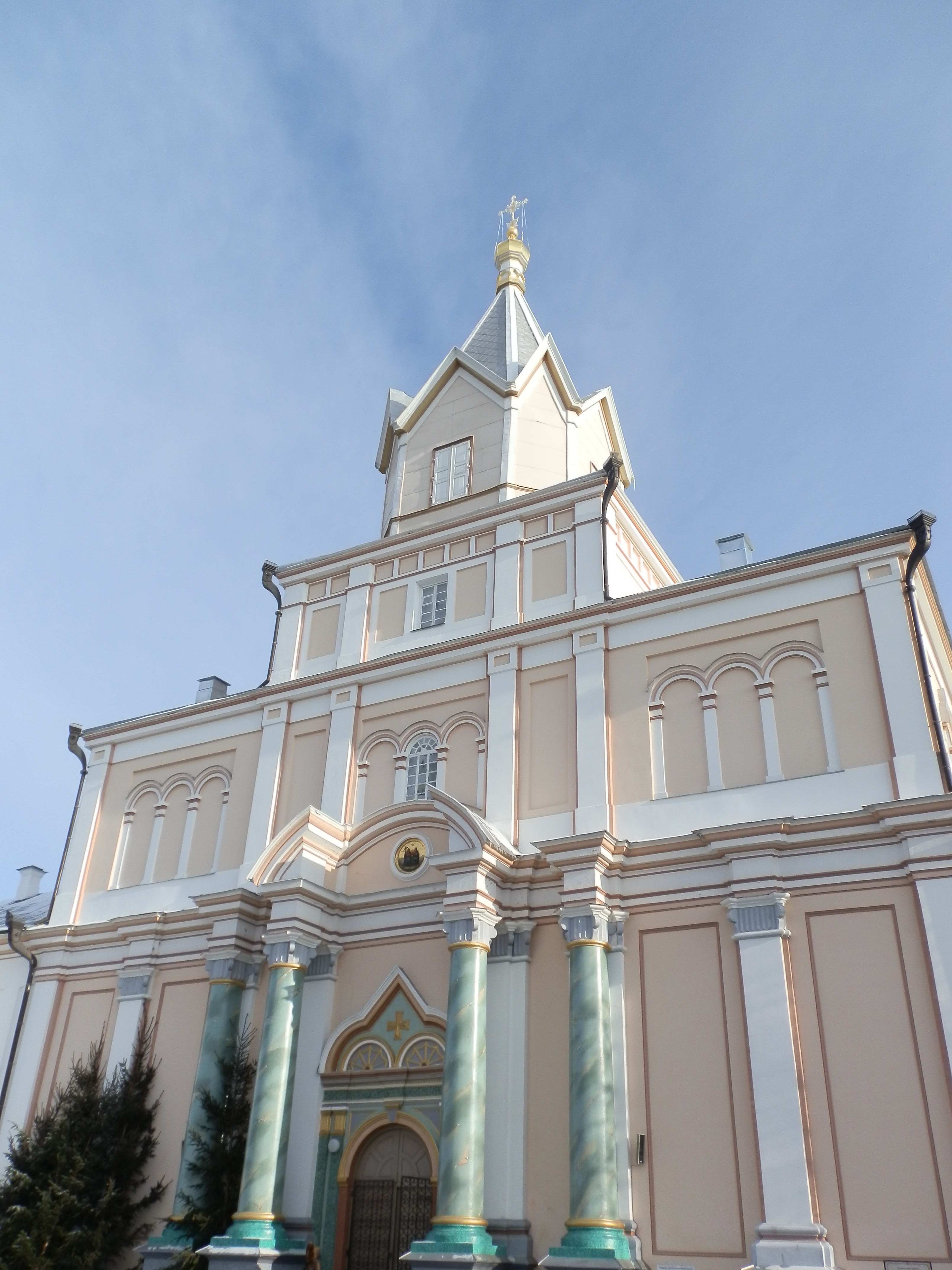 Вид на храм